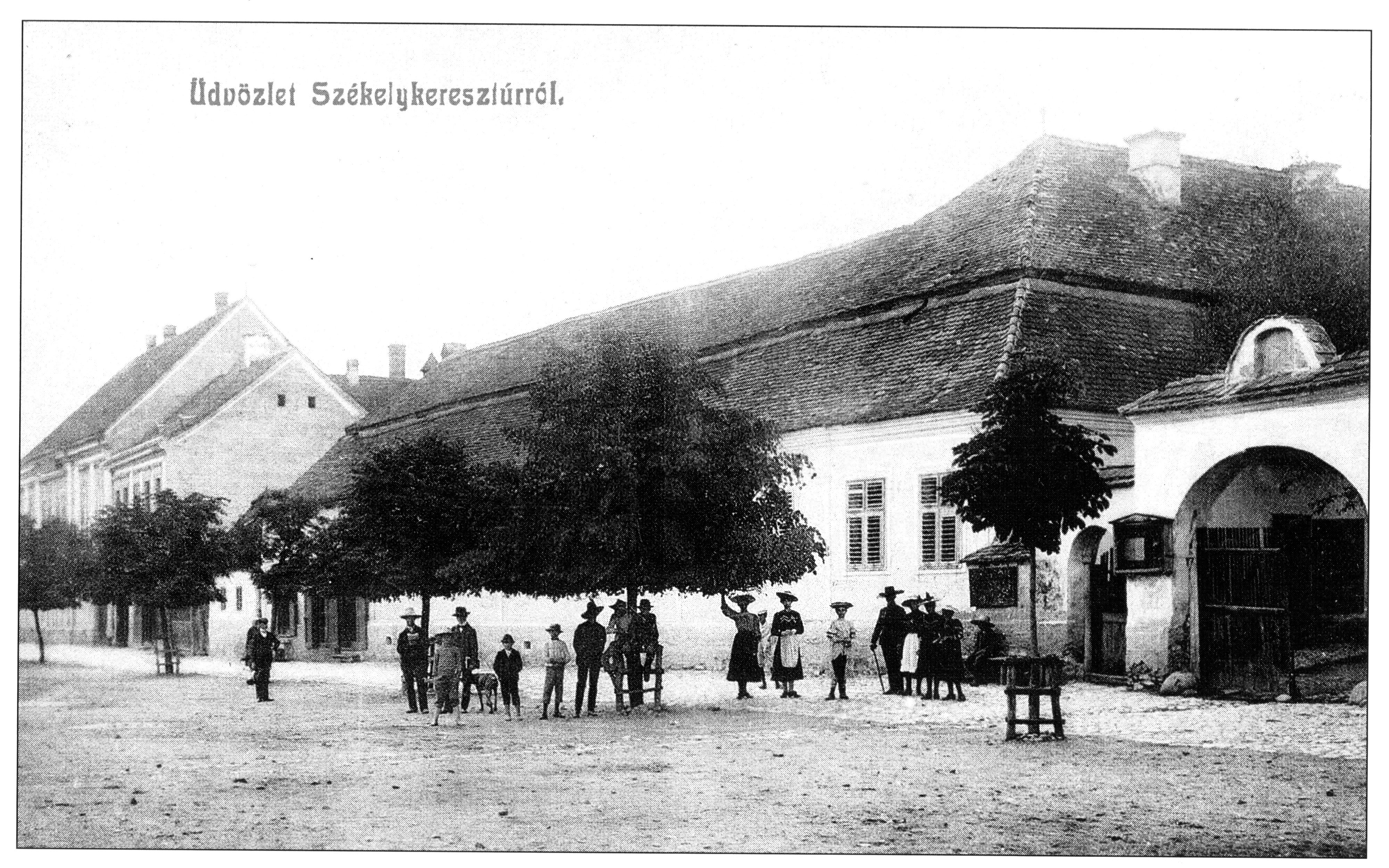 Székelykeresztúr – Old Town Hall (1) Az 1900 –as évek kezdetén készült képeslap. Ismeretlen fényképész fényképe. Scanned on the 23rd of February, 2013. Székelykeresztúr, Magyar Királyság. Bíró udvarház. Székelykeresztúr képviselő testülete 1880 –ban úgy határozott, hogy régi épülete helyett a város központjában levő telkes házat vásárol, Bíró Zsuzsanna és Török Teréz hosszan elnyúló hatalmas épületét. A vételár 10.000 Ft.-volt. A házat a hagyomány szerint a homoródszentmártoni Bíró család épitette 1670 körül. Mansard szerkezetű kettős födémét 1817 táján kapta. A helybeliek úgy tudták Orbán János szerint, hogy a ház tetőzetének és a fiatfalvi Ugron kastély valamint a betfalvi Bíró udvarház tetőzetének építőmestere ugyanaz volt. A két szomszédos ház tulajdonosai Szász Lajos és Papp János voltak. Később asztalosműhely működött az épületben. Források: Bözödi György: Székelyek Turul Sajtóvállalat, Budapest,1943, Vofkori György: Székelykeresztúr képes története Polis, 2012, Kolozsvár ISBN 973 8341 03 5 Apáink arca Veszprém, 2009, ISBN 978 963 06 6757 9 Tags: Székelykeresztúr Gyallay-Pap Sándor Elekes Judit